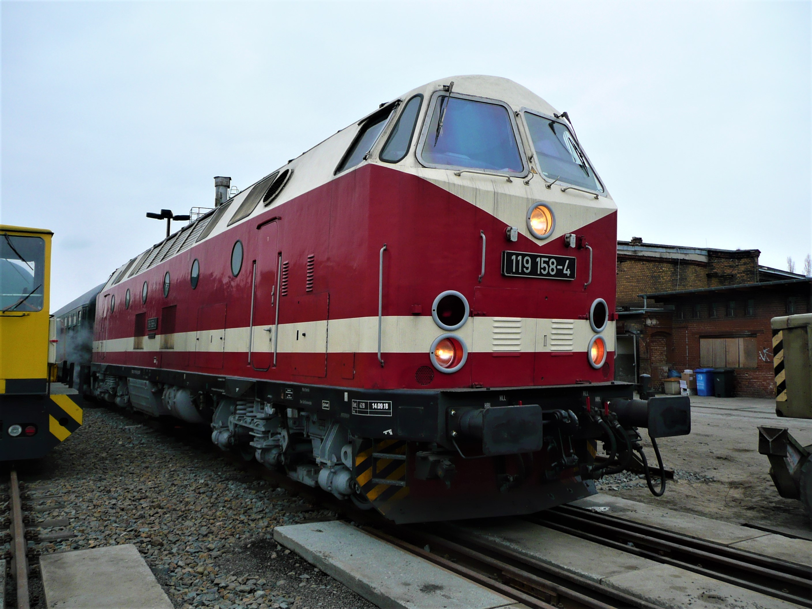 119 158 im Depot Berlin Schöneweide